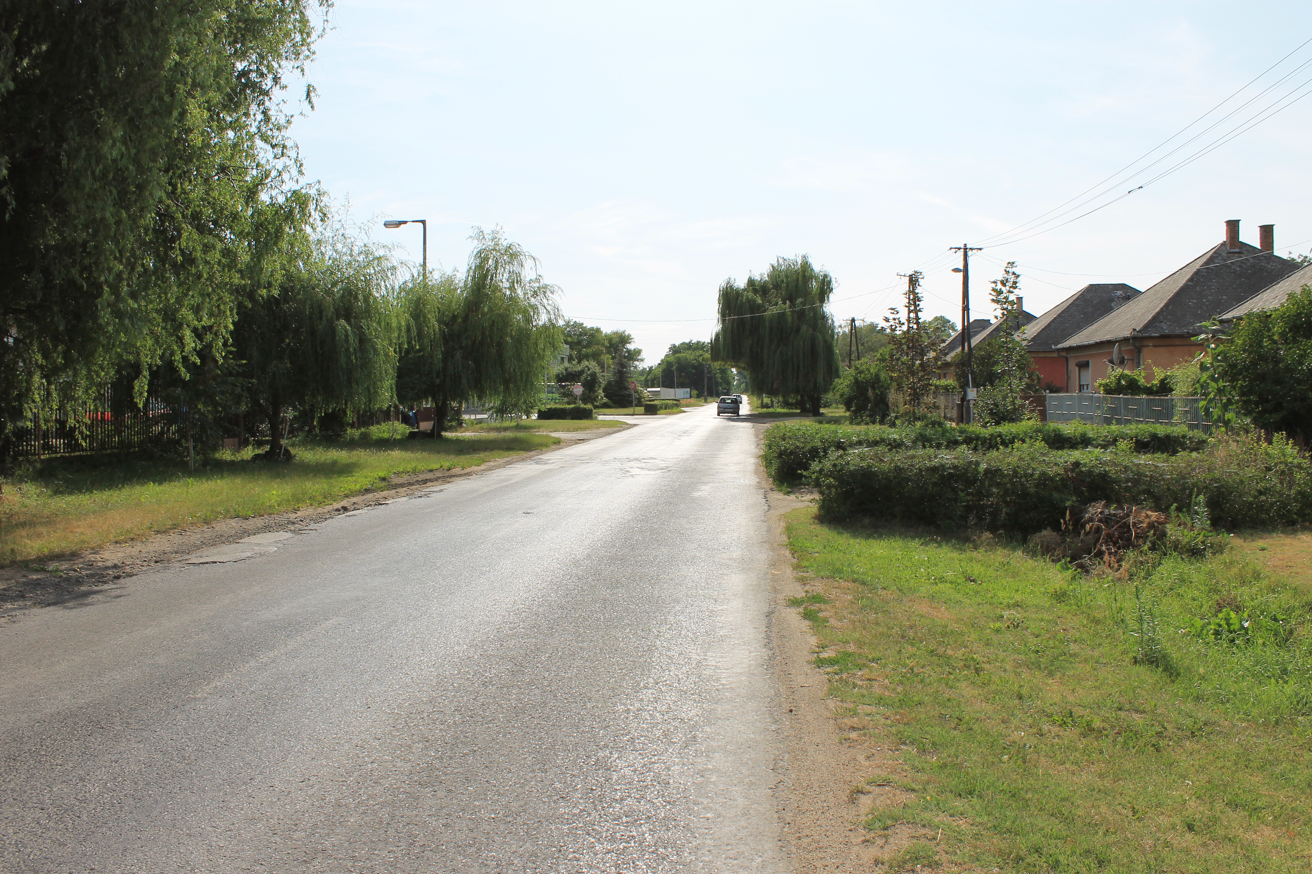 Balkányi utcakép (Bocskai utca)